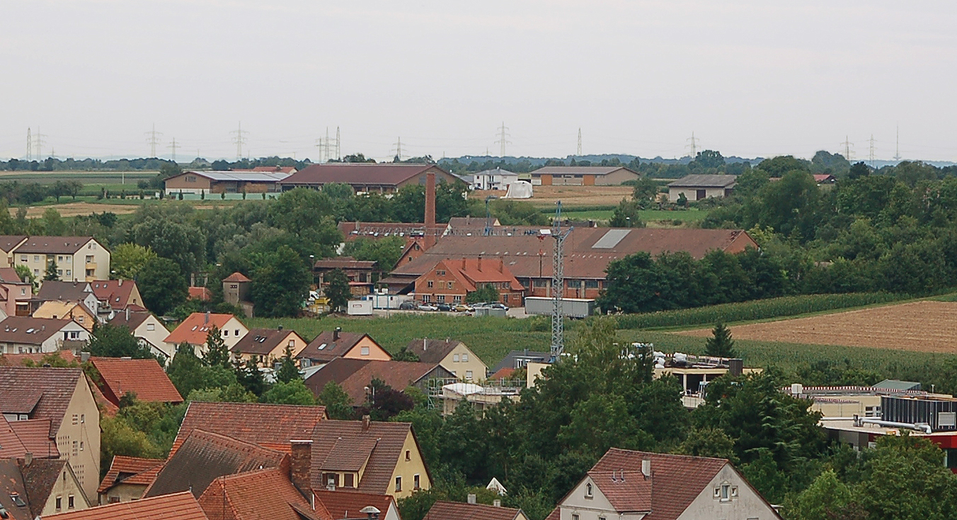 Alte Ziegelei und Aussiedlerhöfe in Markgröningen (vom Oberen Tor aus)